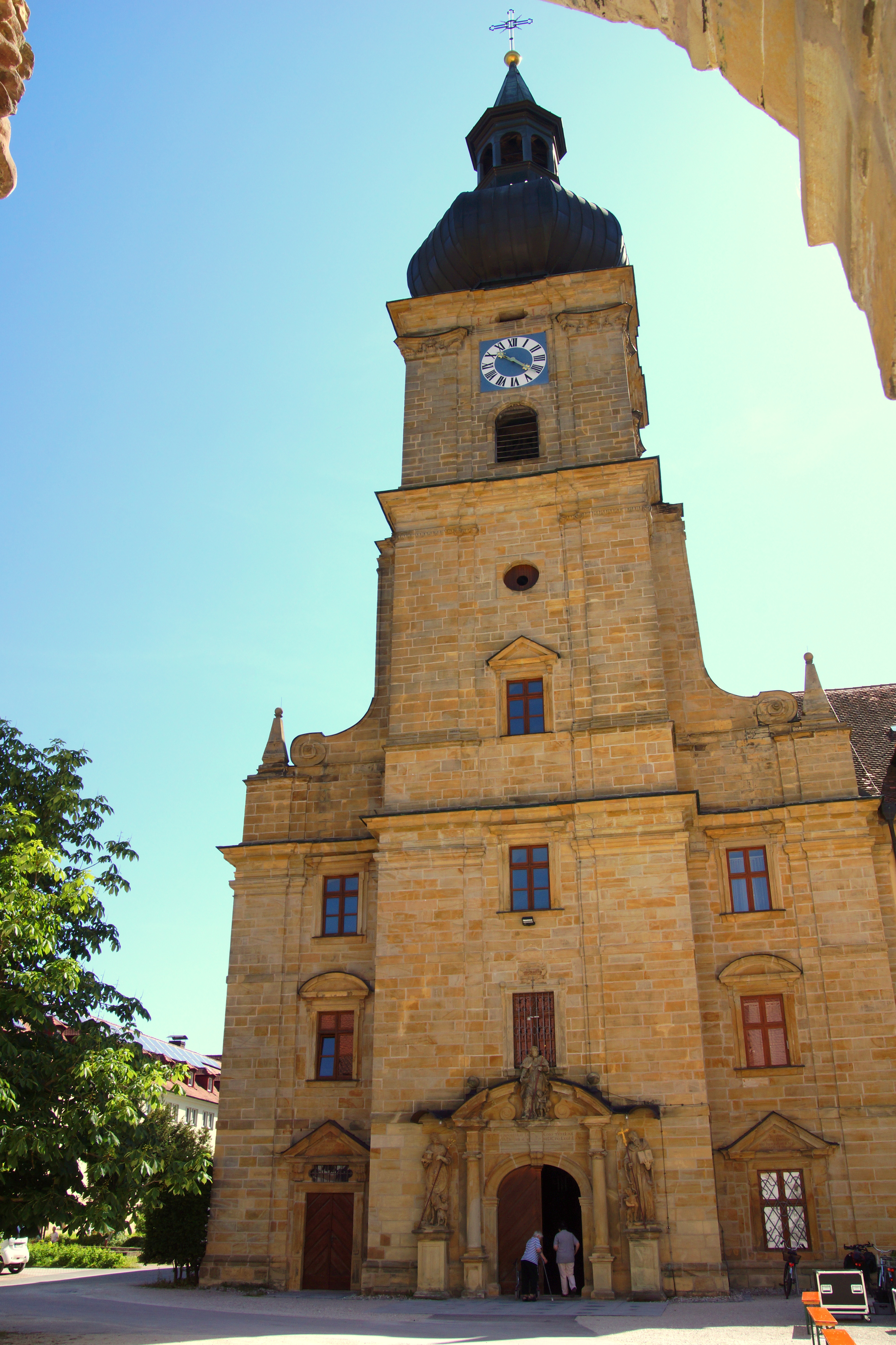 Die Klosterkirche St. Jakob im Oberpfälzischen Ensdorf